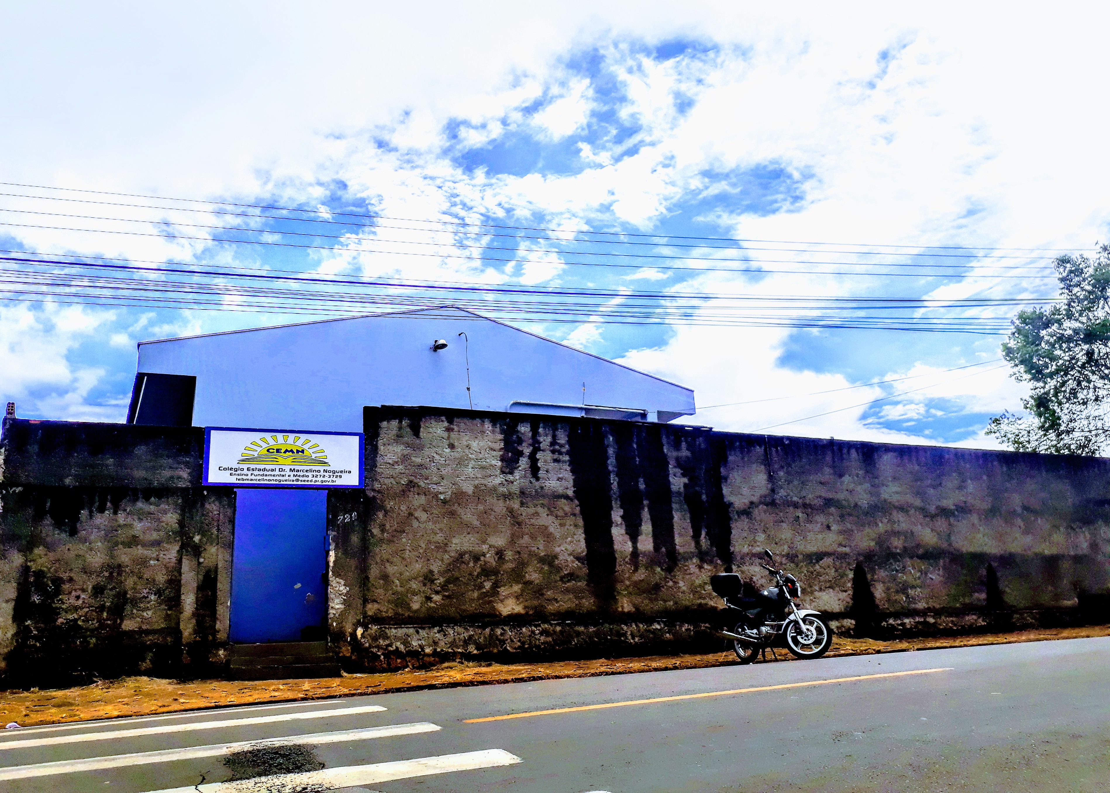 Colégio Estadual Dr. Marcelino Nogueira, em Telêmaco Borba, no Paraná.